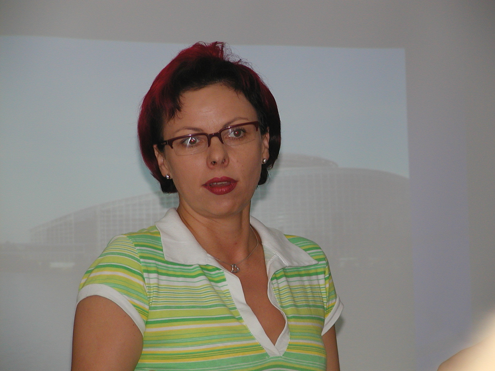 auteur foto: Yves Nevelsteen datum: augustus 2006